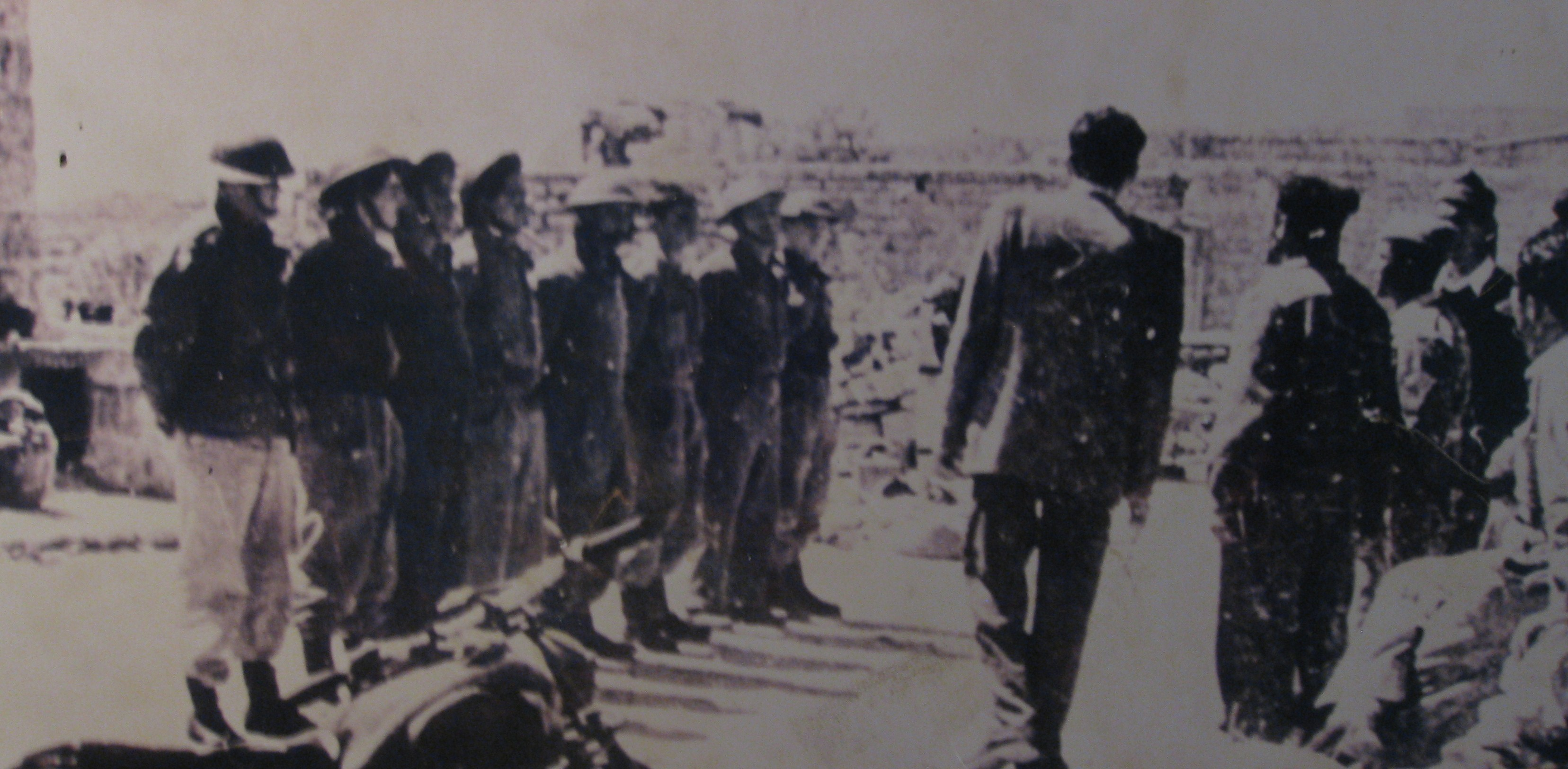 Beit Gidi Exhibits מוצגים בבית גידי - מוזיאון האצל בתש"ח מסדר העברת הכפר דיר יסין לידי ההגנה